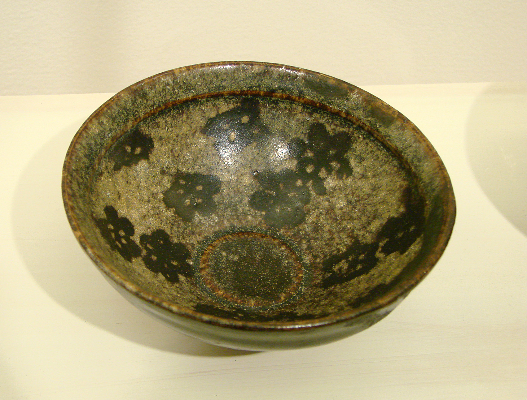 Bol à thé,Chine du Sud, Jiangxi, Jizhou. Dynastie des Song du Sud, 12ème-13ème siècle. Grès gris à couverte brune et grise, décor floral à partir de papier découpé. Musée Guimet, Paris.